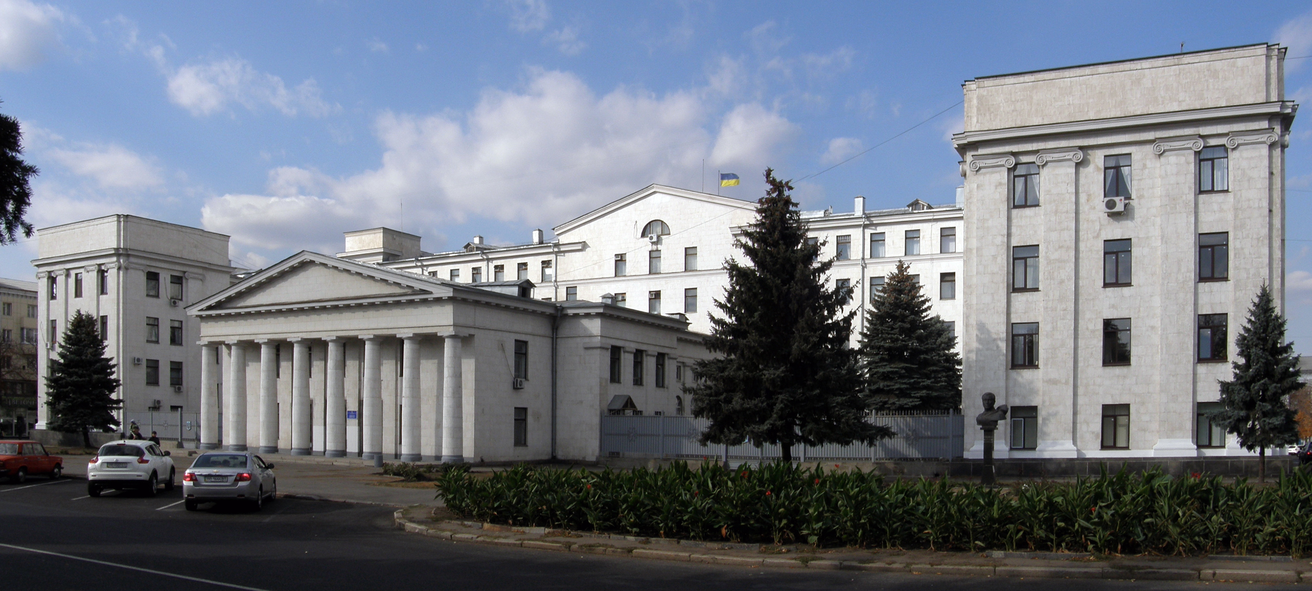 Луганский областной совет